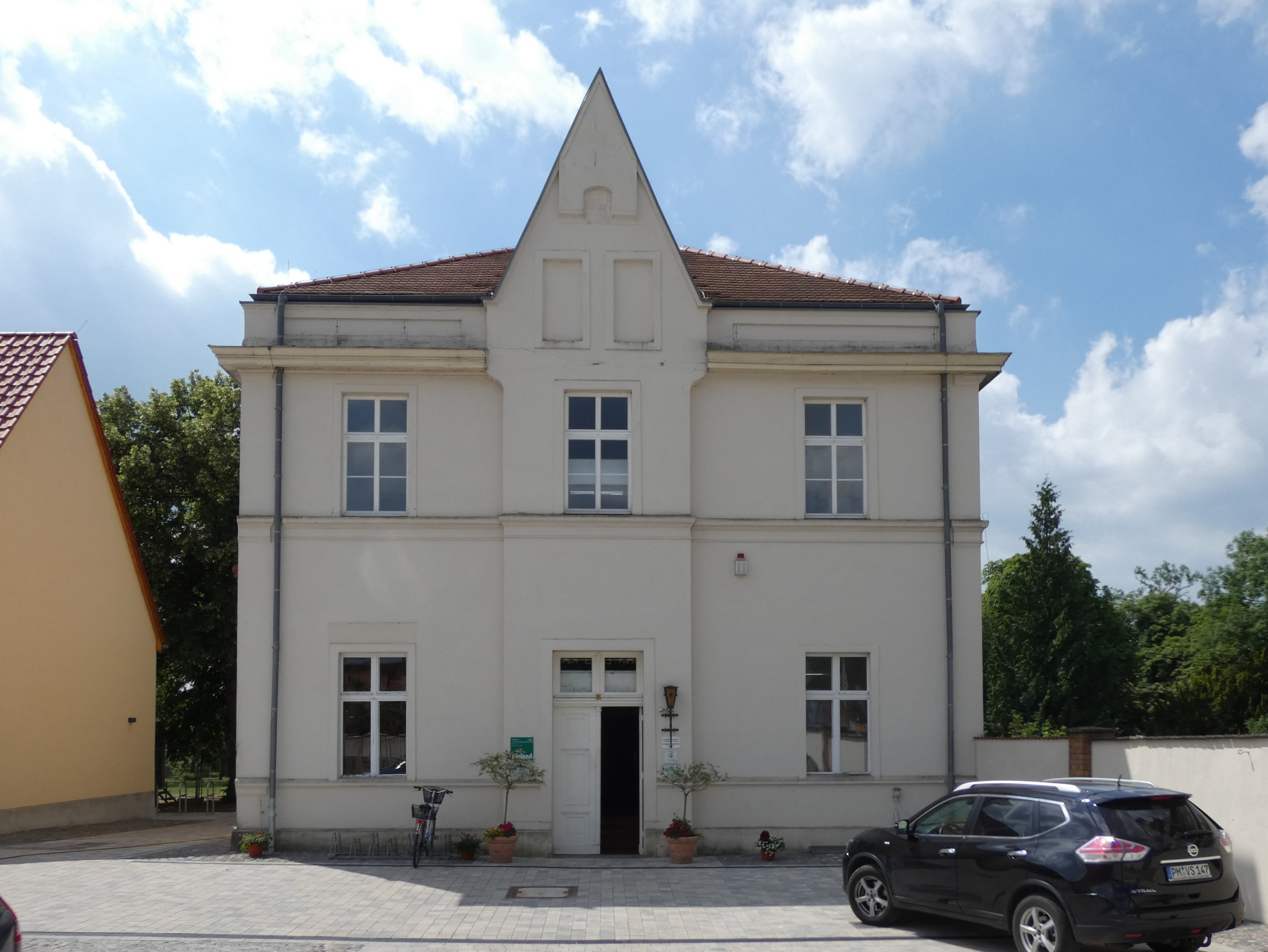 Gut Schmerwitz, Verwalterhaus